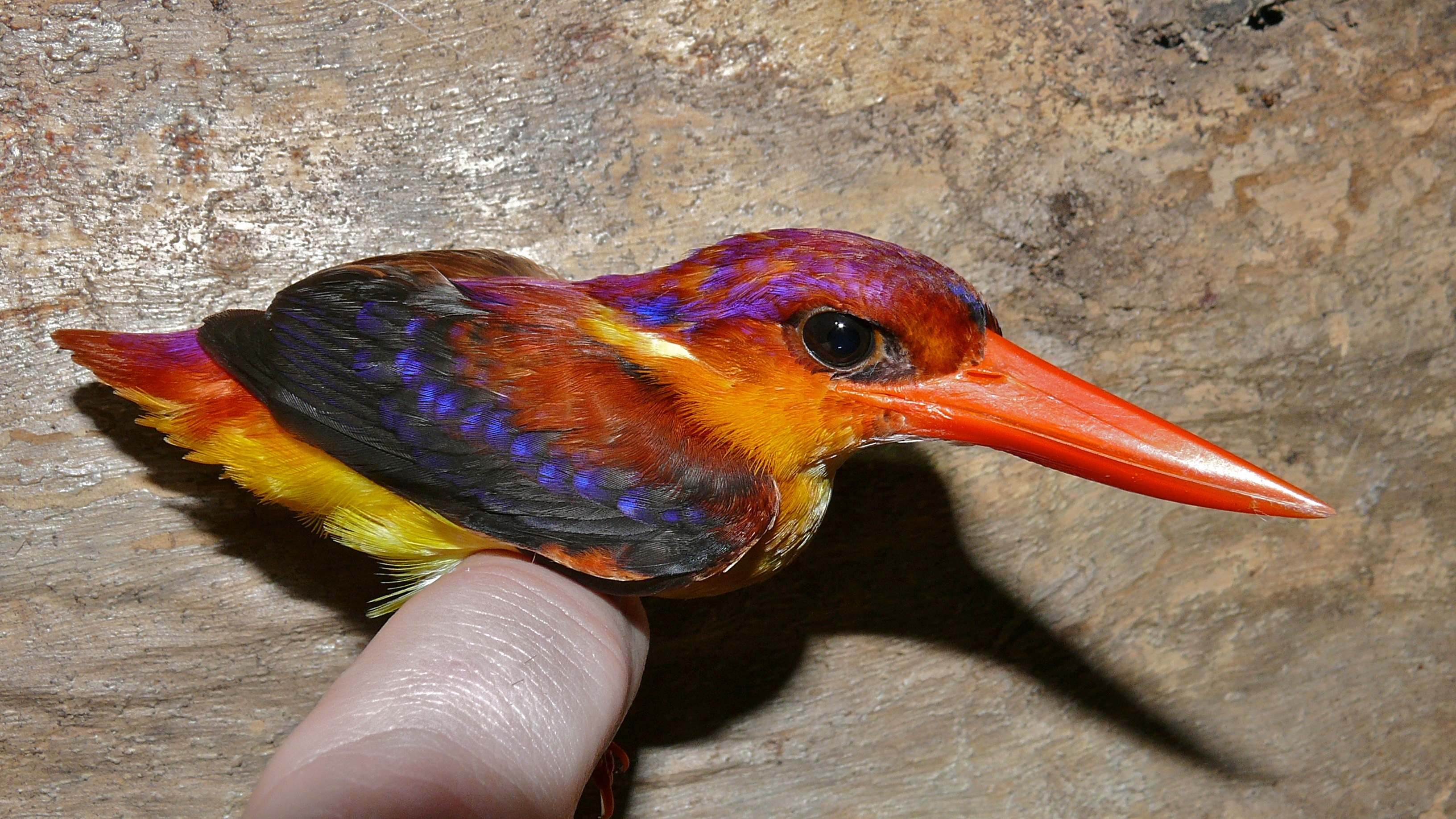 Gunung Mulu NP, Sarawak, MALAYSIA